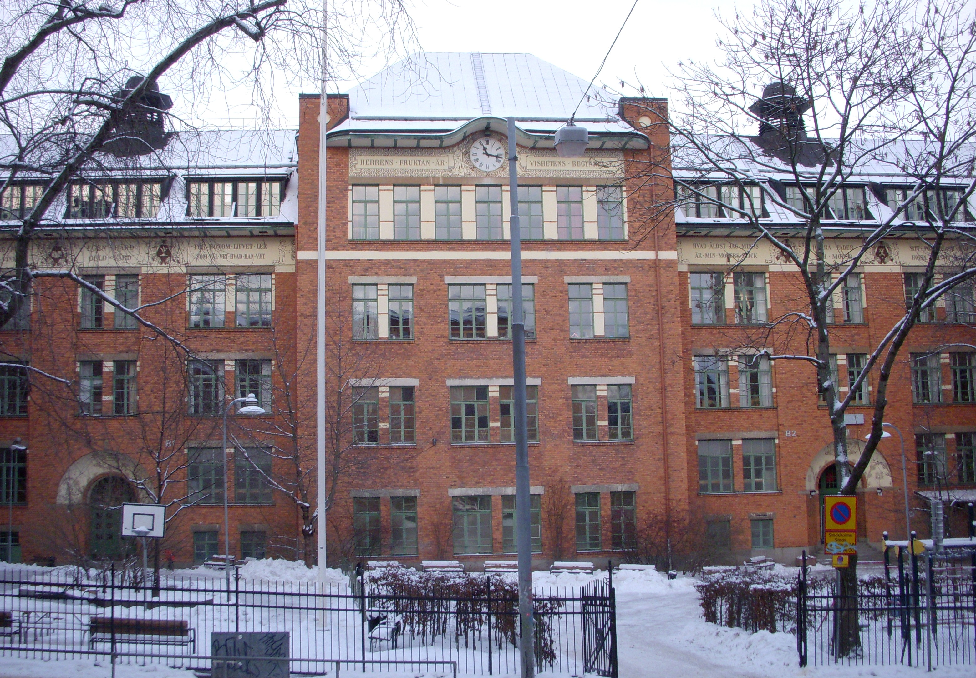 Matteusskolan på Norrmalm i Stockholm